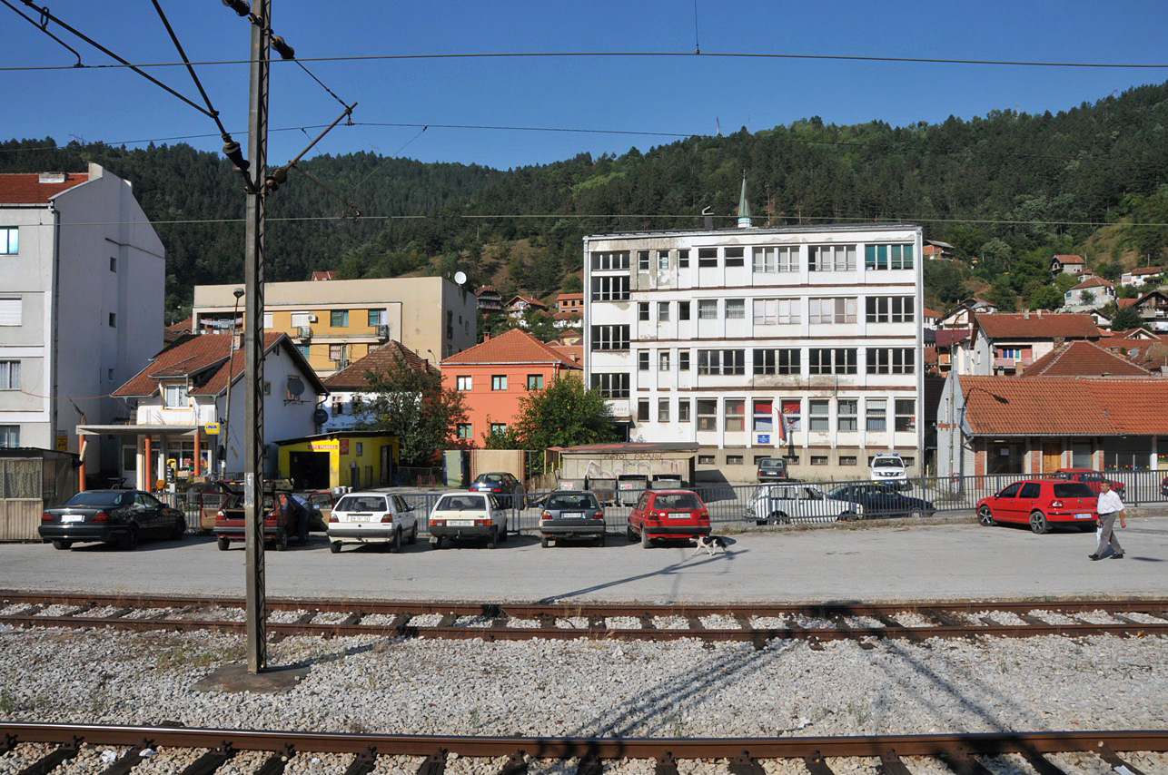 Priboj, Serbia